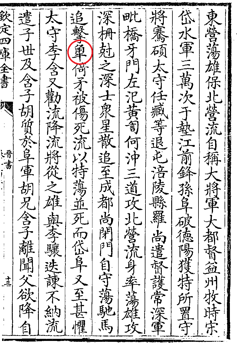 四庫全書本《晉書》，有“𧢻”字。